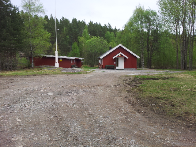 Skytterhuset på Linnerekka Skytebane på Øvre Killingmo i Aurskog.